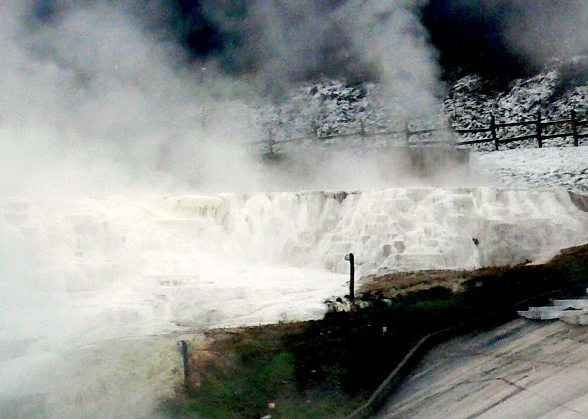 a 65-68 °C víz által létrehozott "sódomb", ásványi anyag lerakódás